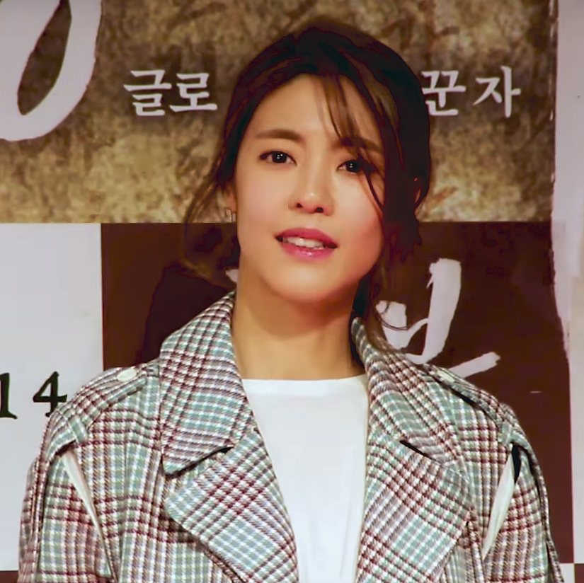 영화 '흥부' VIP시사회 포토월